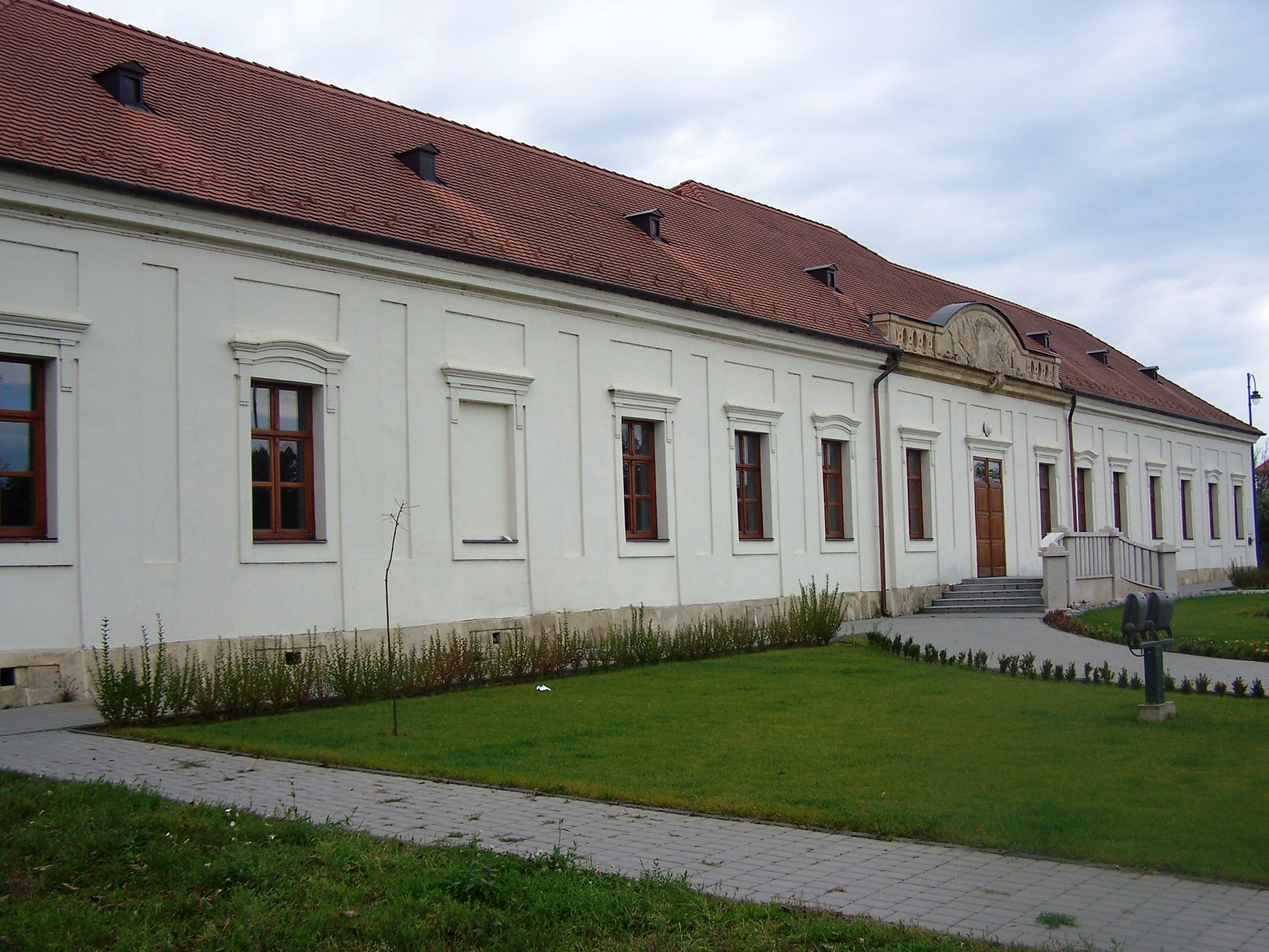 Beleznay-kastély (Bugyi, Beleznay tér 3.) This is a photo of a monument in Hungary. Identifier: 11717